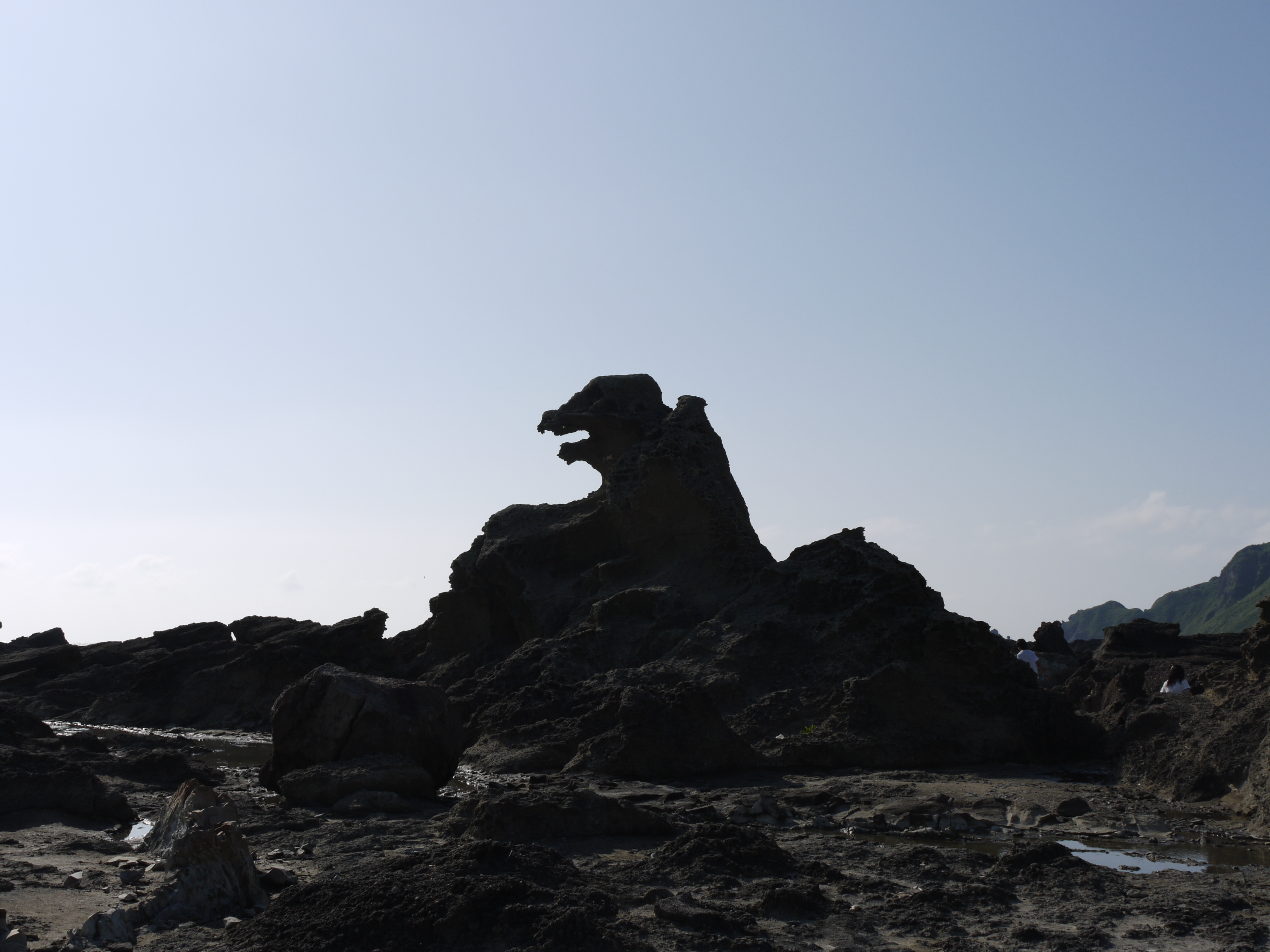 ゴジラ岩（秋田）